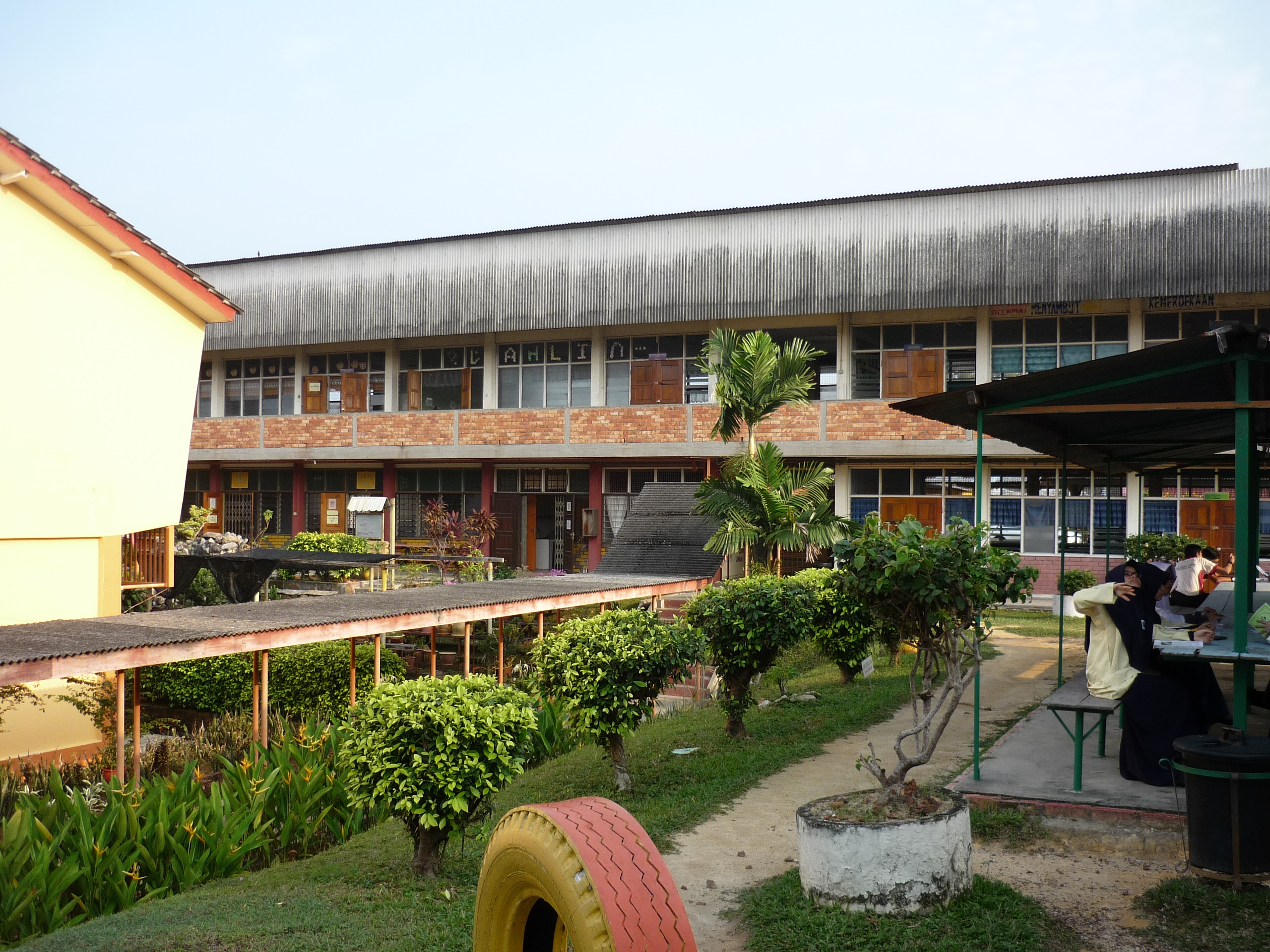 Panorama SMKDA 5